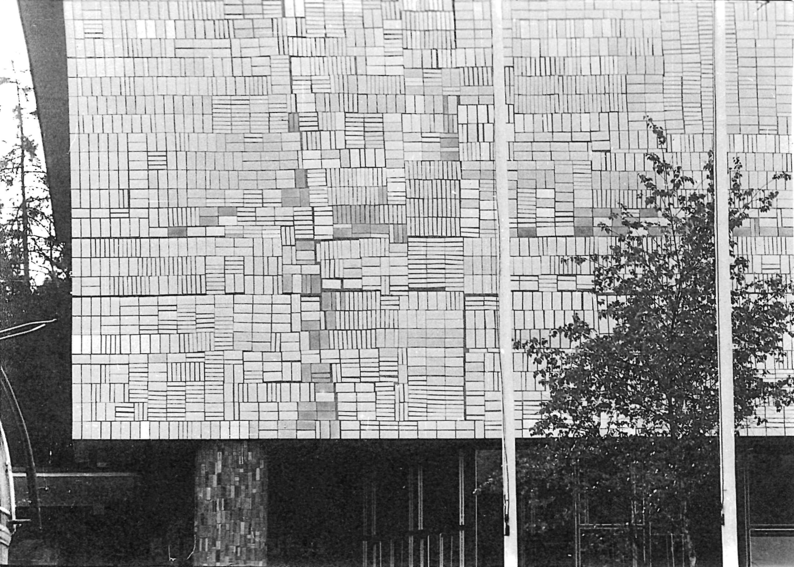 Mensa Stuttgart-Mitte, Holzgartenstraße 11, Vorderfront, 1956.